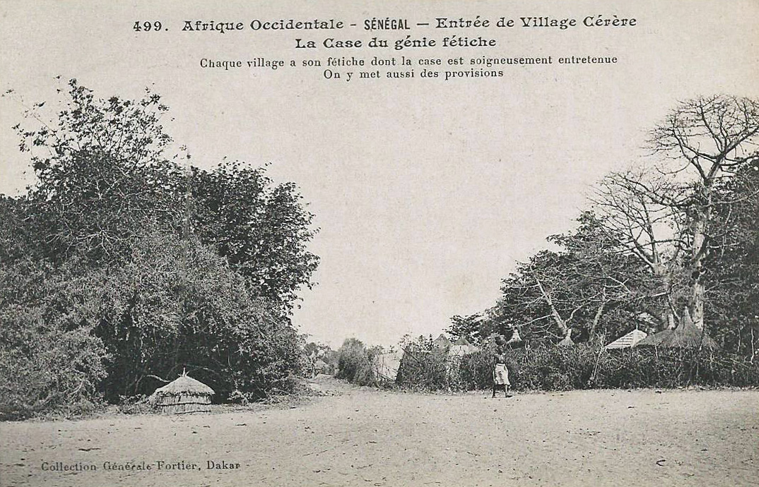 François-Edmond Fortier, Sénégal. Entrée de village cérère. La case du génie fétiche. Afrique Occidentale - Sénégal.